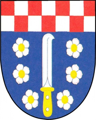 znak, Kuchařovice, okres Znojmo